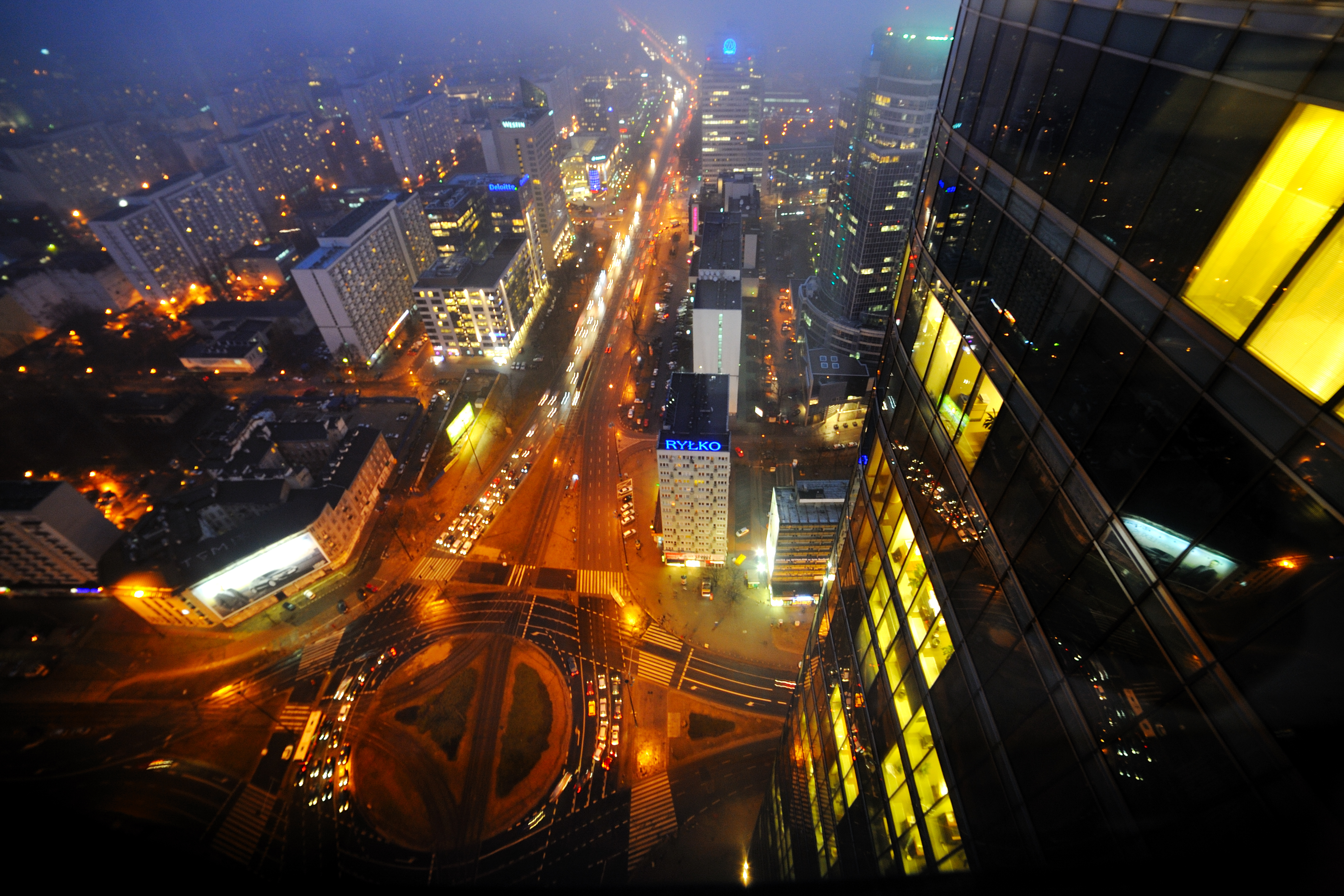 Photo Day 9.0 (Rondo 1)